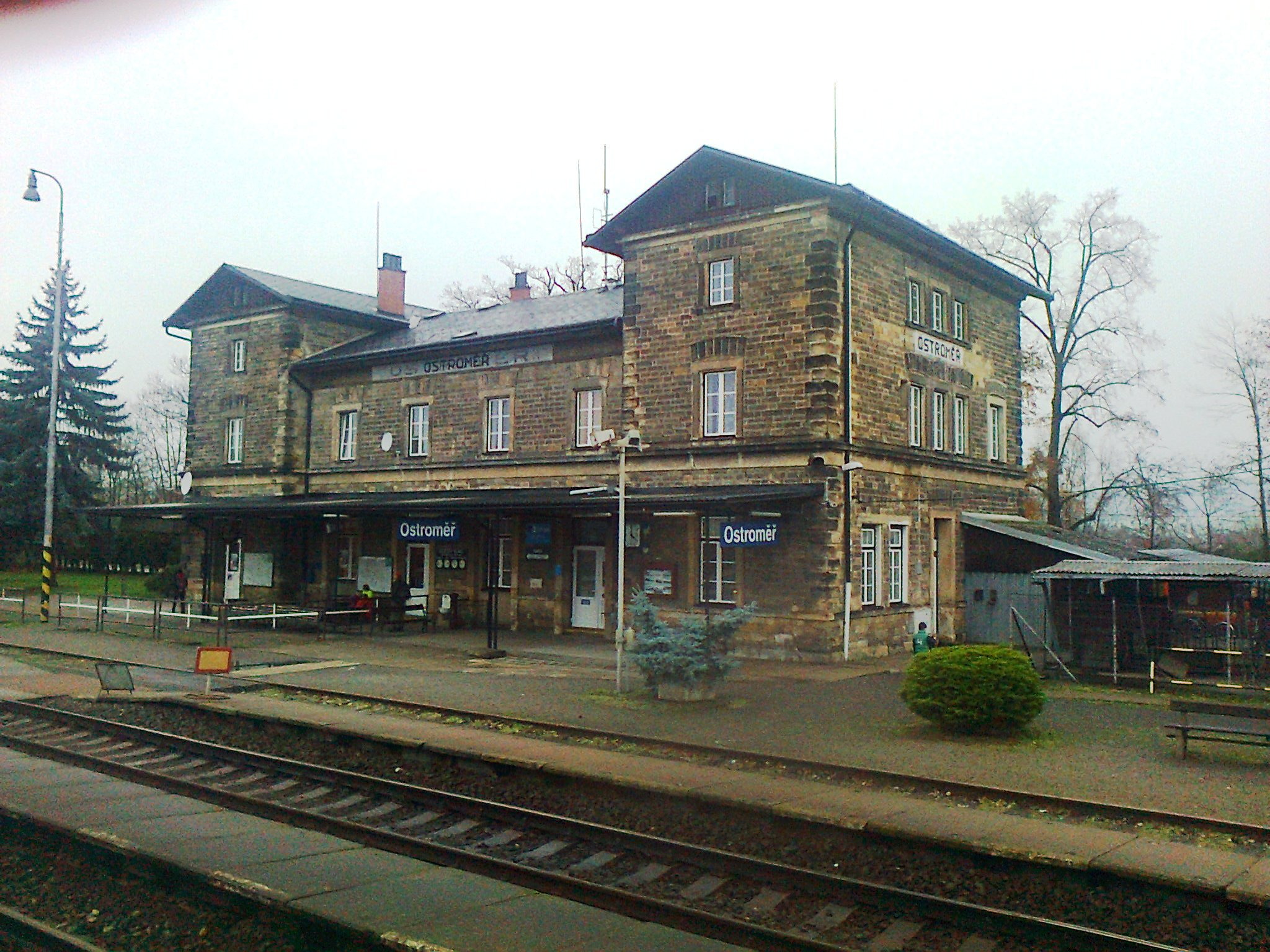 Ostroměř, okres Jičín, nádraží.